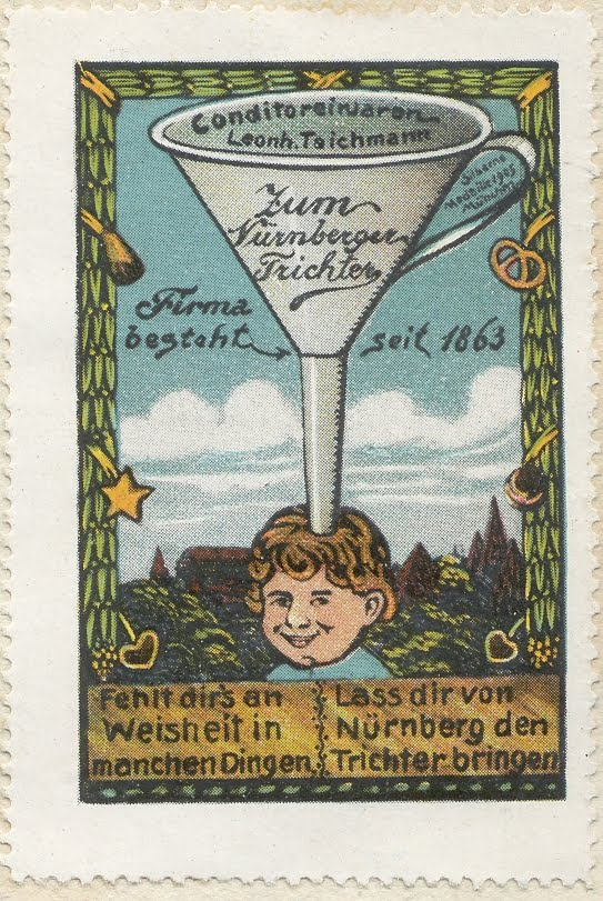 Nuremberg Funnel; advertising stamp, 1910